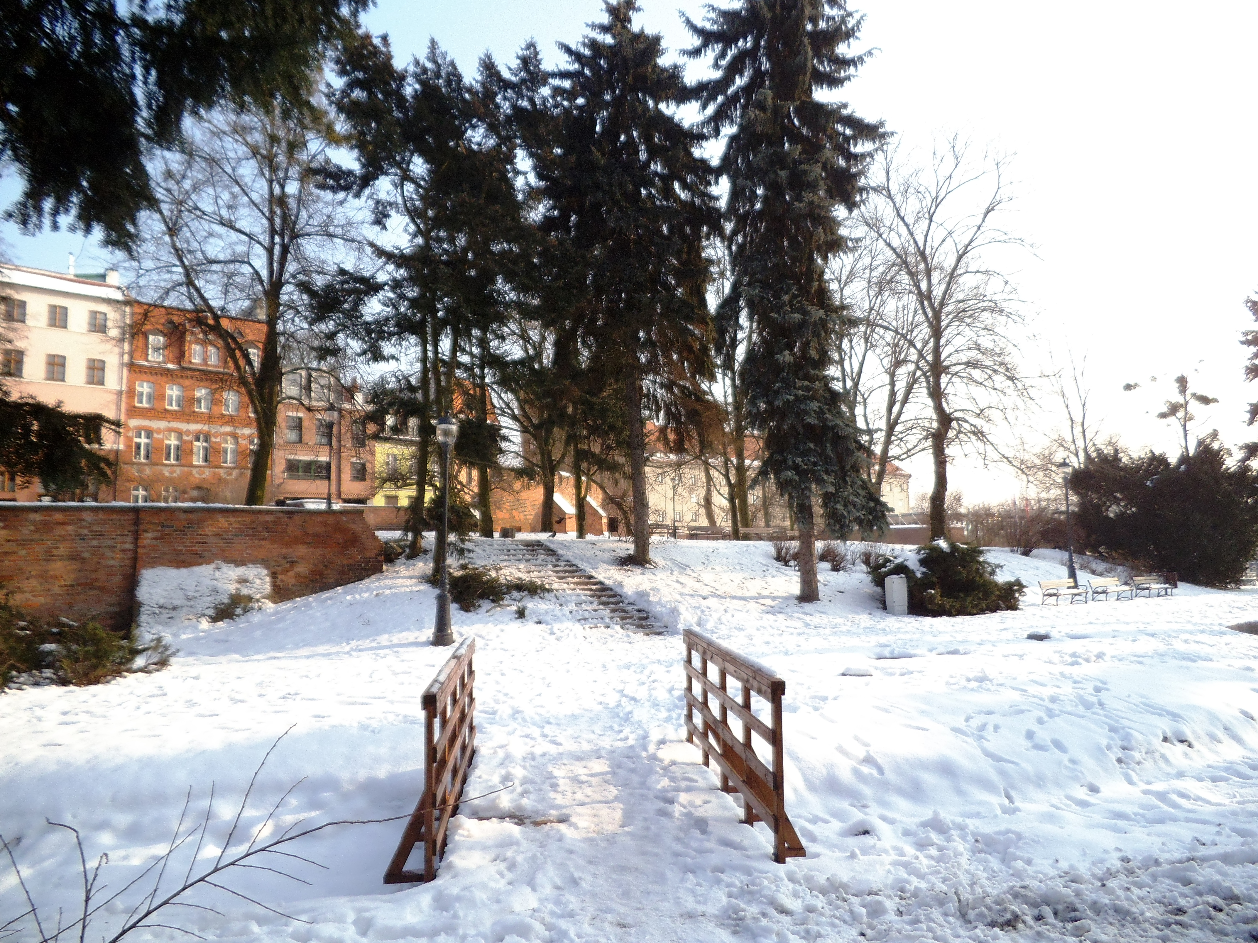 Alpinarium, zima